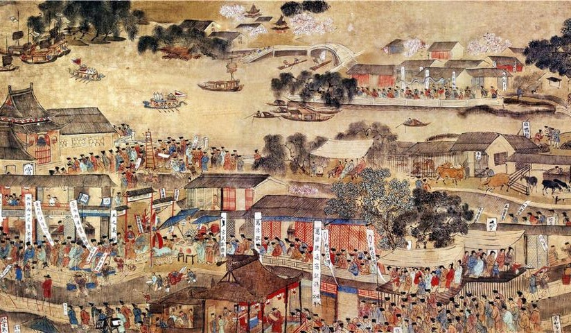 仇英《南都繁会图》描绘了明代南京的都市风貌